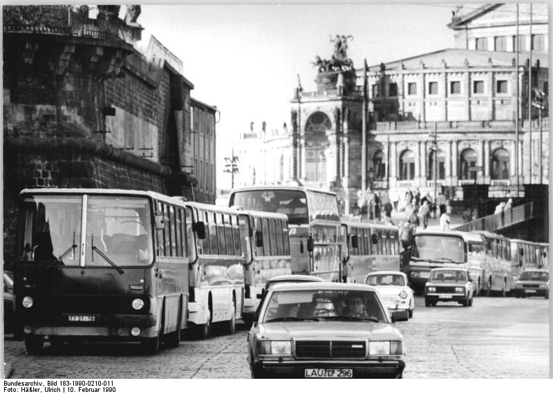 Dresden, Omnibusse ADN-ZB Häßler 10.2.1990 Dresden: Touristen-Die Sonne bringt es an den Tag: Mehr denn je ist die sächsische Kunstmetropole eine bevorzugte Adresse für Touristen aus West und Ost. Am Terrassenufer der Semperoper "stapeln" sich die Busse.